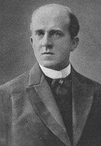 Gunnar Klintberg (1870-1936)